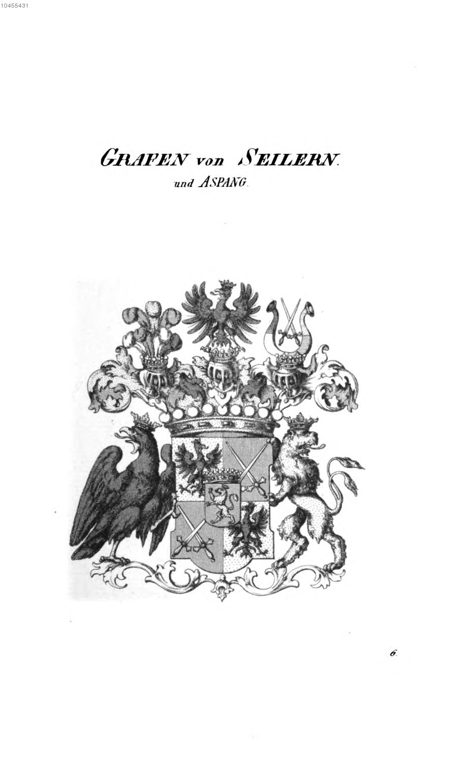 Wappen Seilern und Aspang 4 - Tyroff AT.jpg